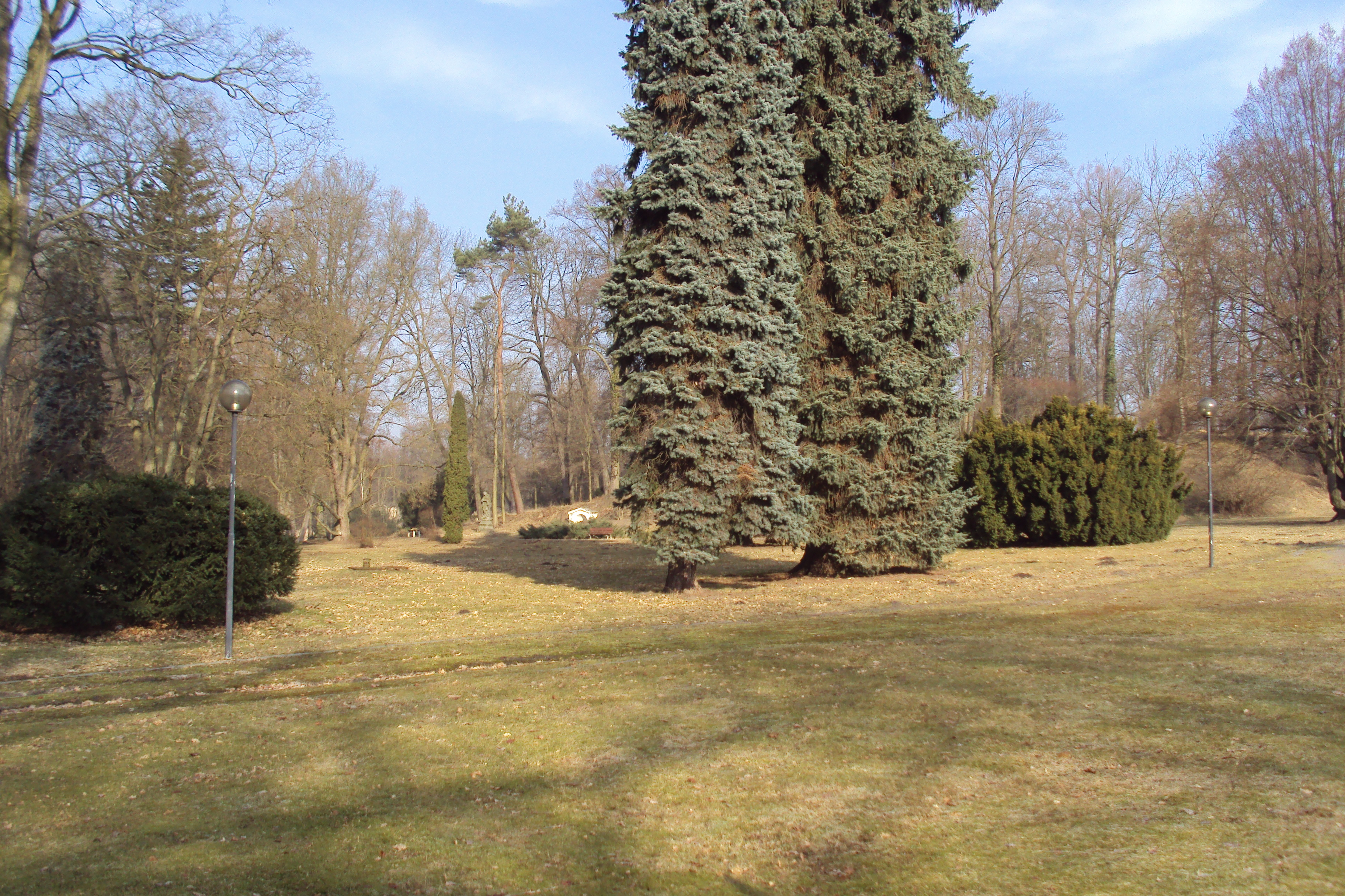 Park u zámku Zahrádky na Českolipsku